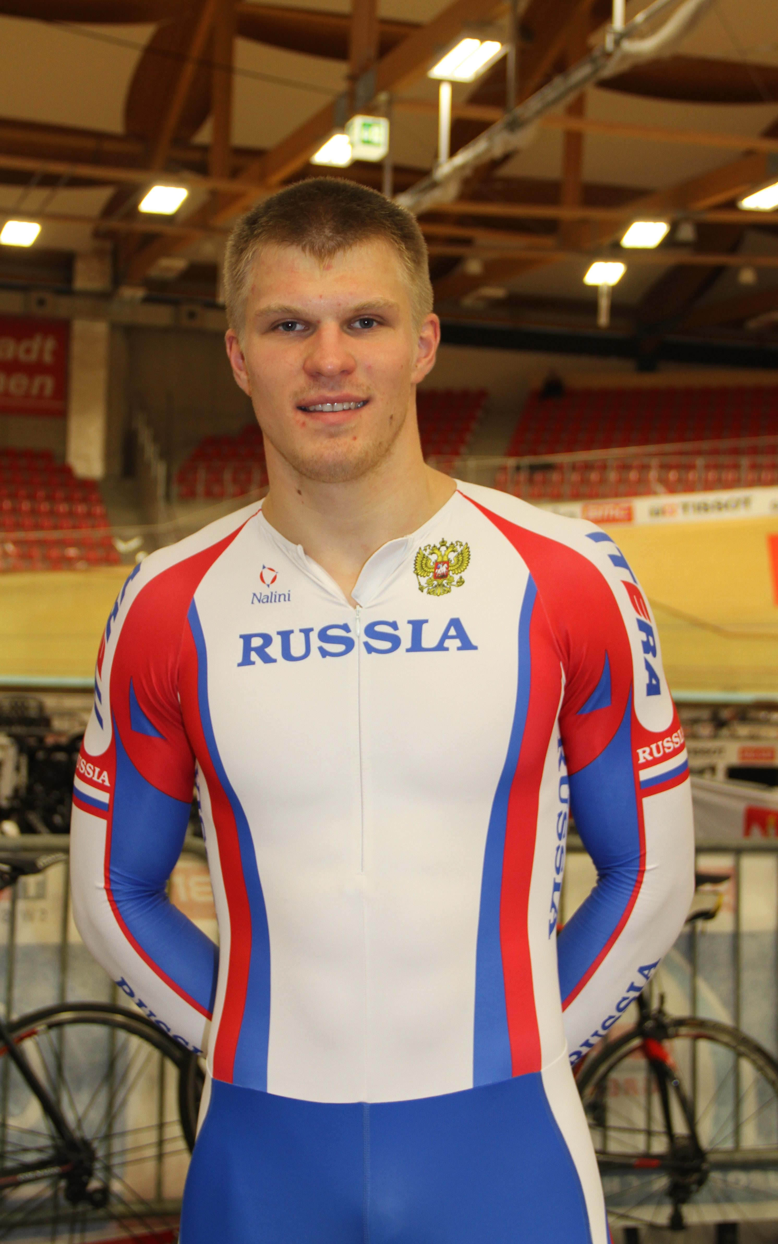 Nikita Shurshin, russischer Radsportler The making of this document was supported by the Community-Budget of Wikimedia Germany.